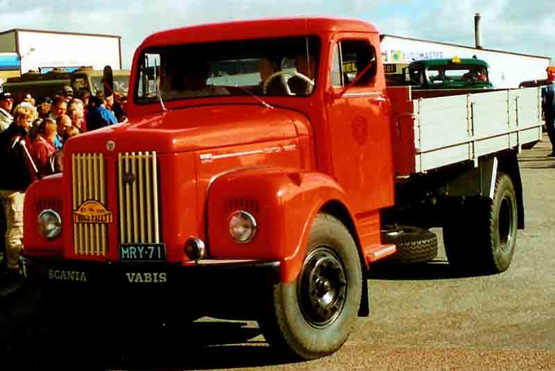 Scania-Vabis L55 Truck